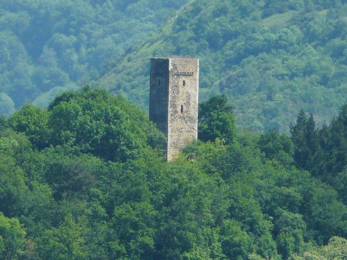 La tour de Vidalos, Agos-Vidalos, Hautes-Pyrénées, France.